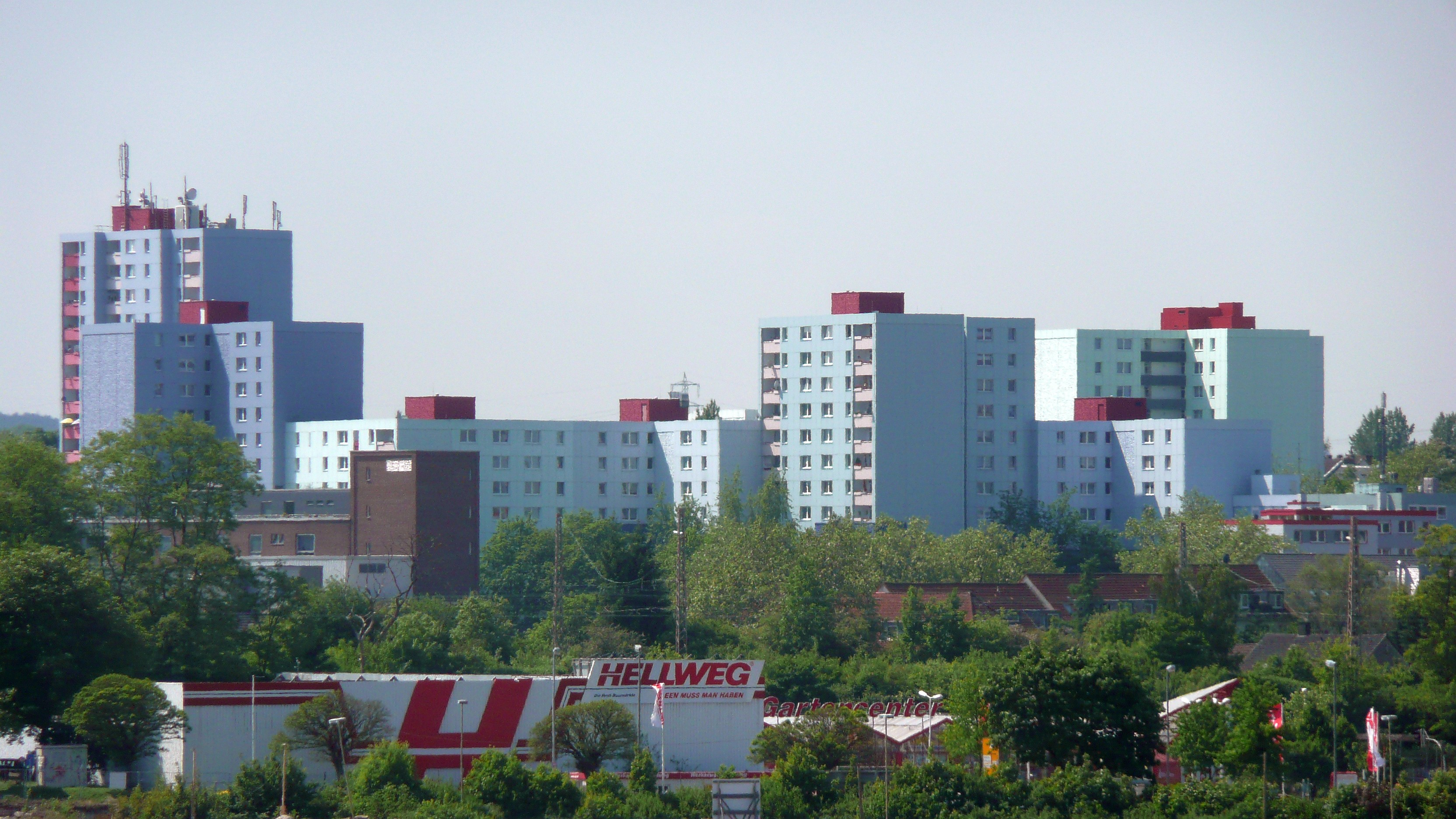 Die Hochhaussiedlung Clarenberg in Dortmund-Hörde